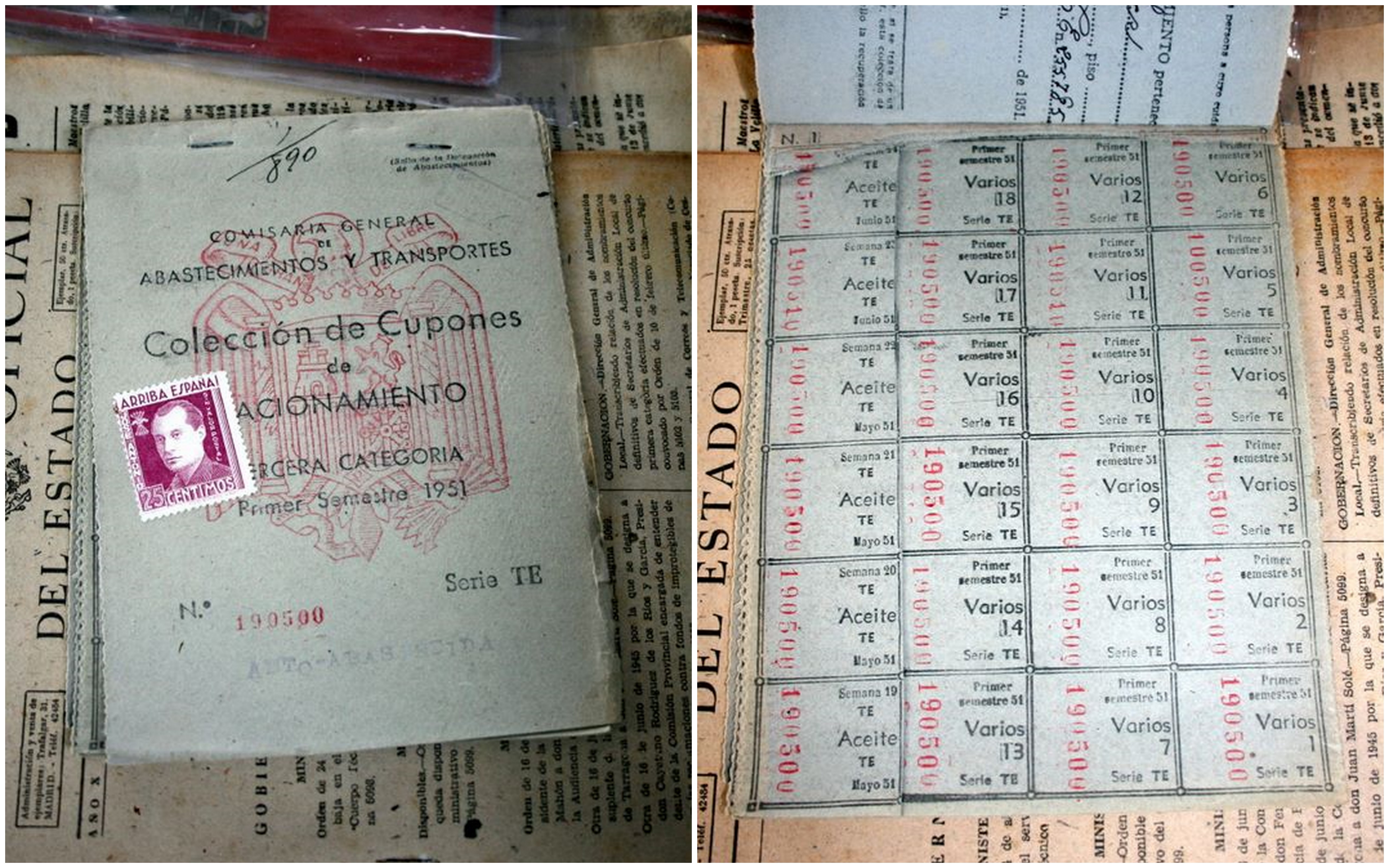 Cartilla de racionamento do ano 1951, habitual na posguerra. Galiza